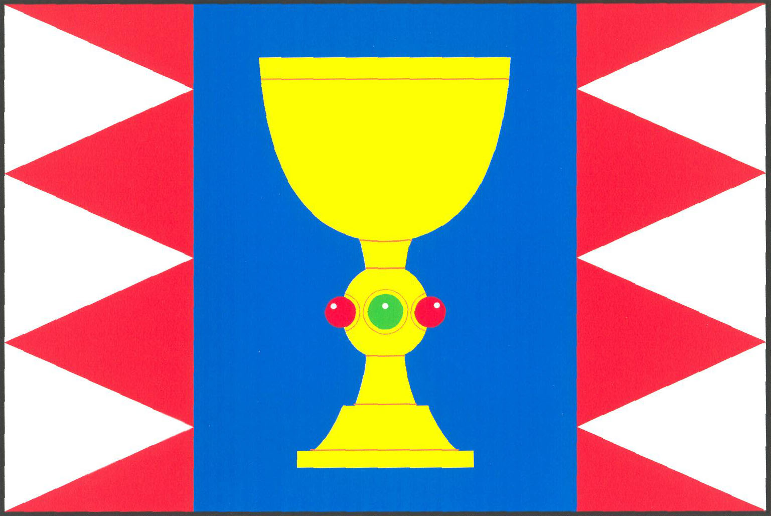 Vlajka obce Dlouhá Lhota